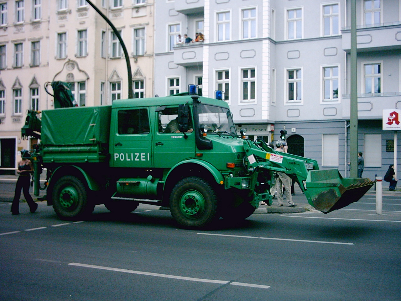 ZumiLa, eine Zugmaschine mit Ladeeinrichtung (Frontlader) auf Basis des Unimog 2150L der Polizei Berlin; Berlin-Lichtenberg